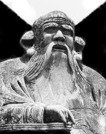 Laotse